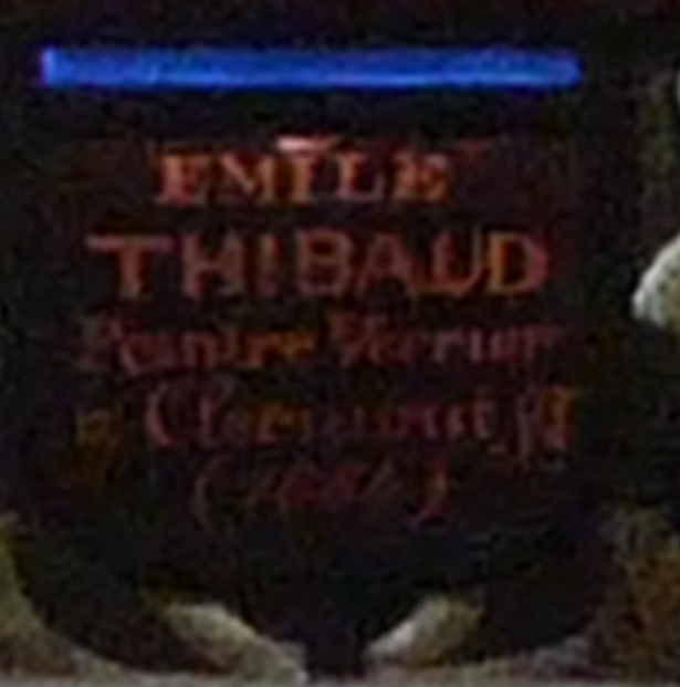 signature du maître verrier Émile Thibaud dans un vitrail de la chapelle de l'ancien hôpital général de Clermont-Ferrand